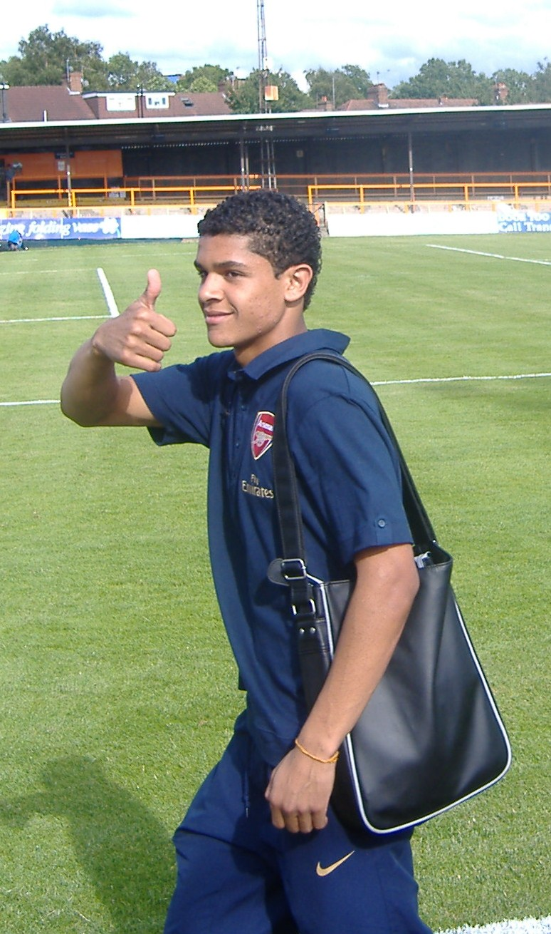 Denílson Pereira Neves